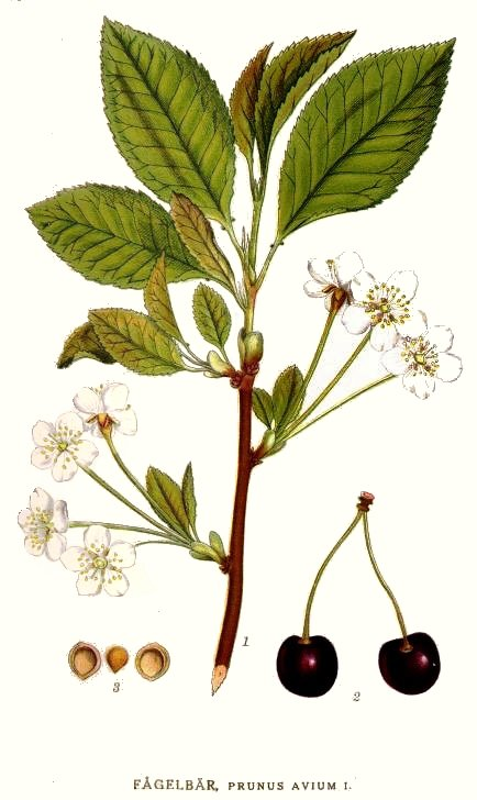 Prunus avium L. Original Description Fågelbär, Prunus avium L.